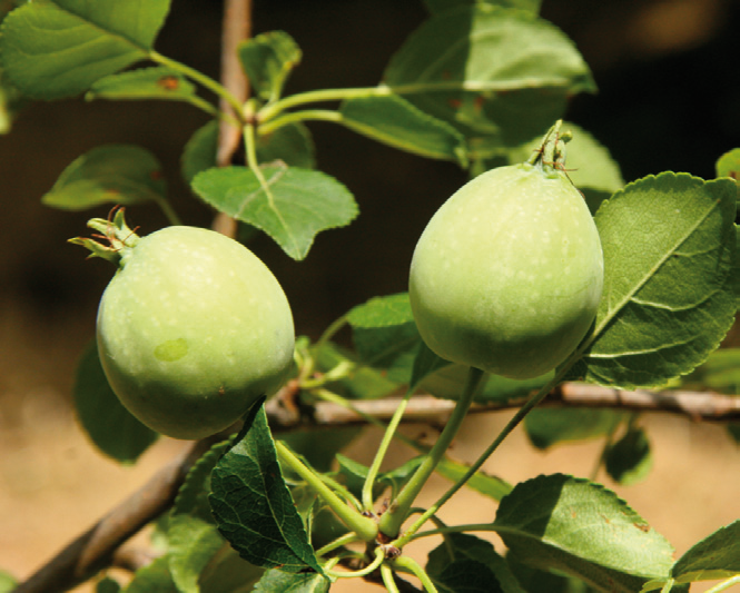 Frutto